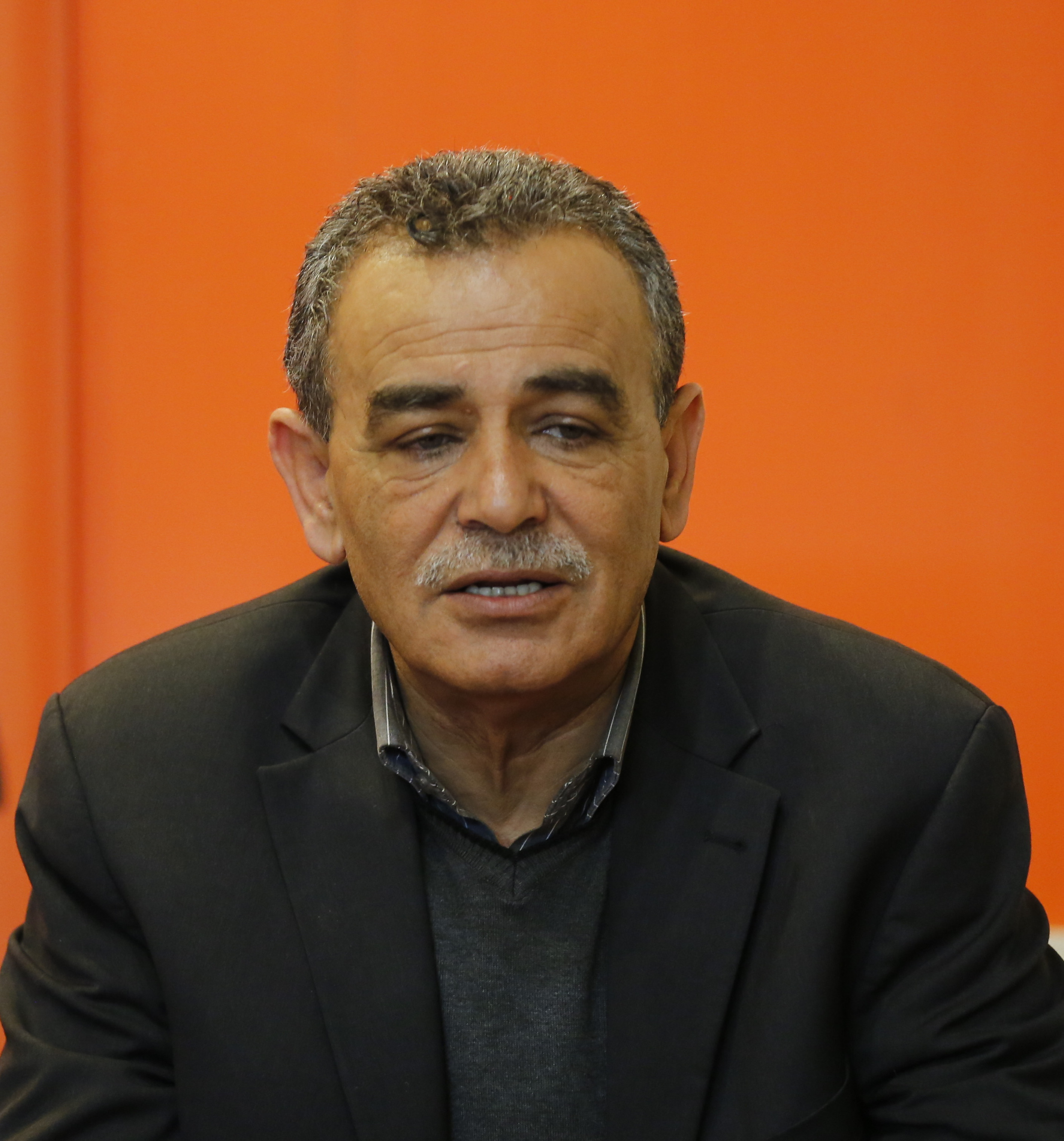 ג'מאל זחאלקה